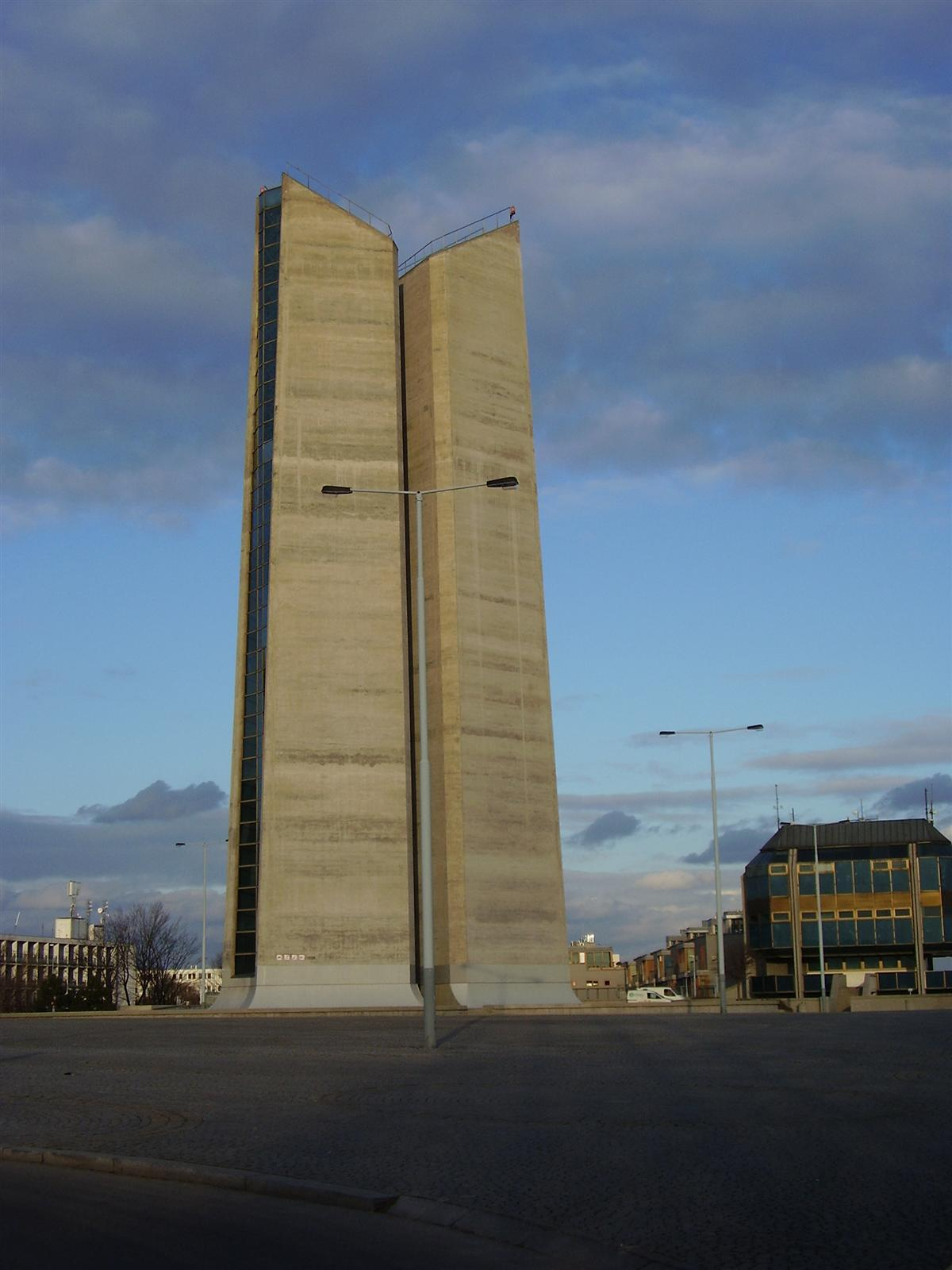 Česky: Odvětrávací věž ze Strahovského tunelu na Strahově v těsné blízkosti Velkého strahovského stadionu